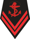 Cabo primero